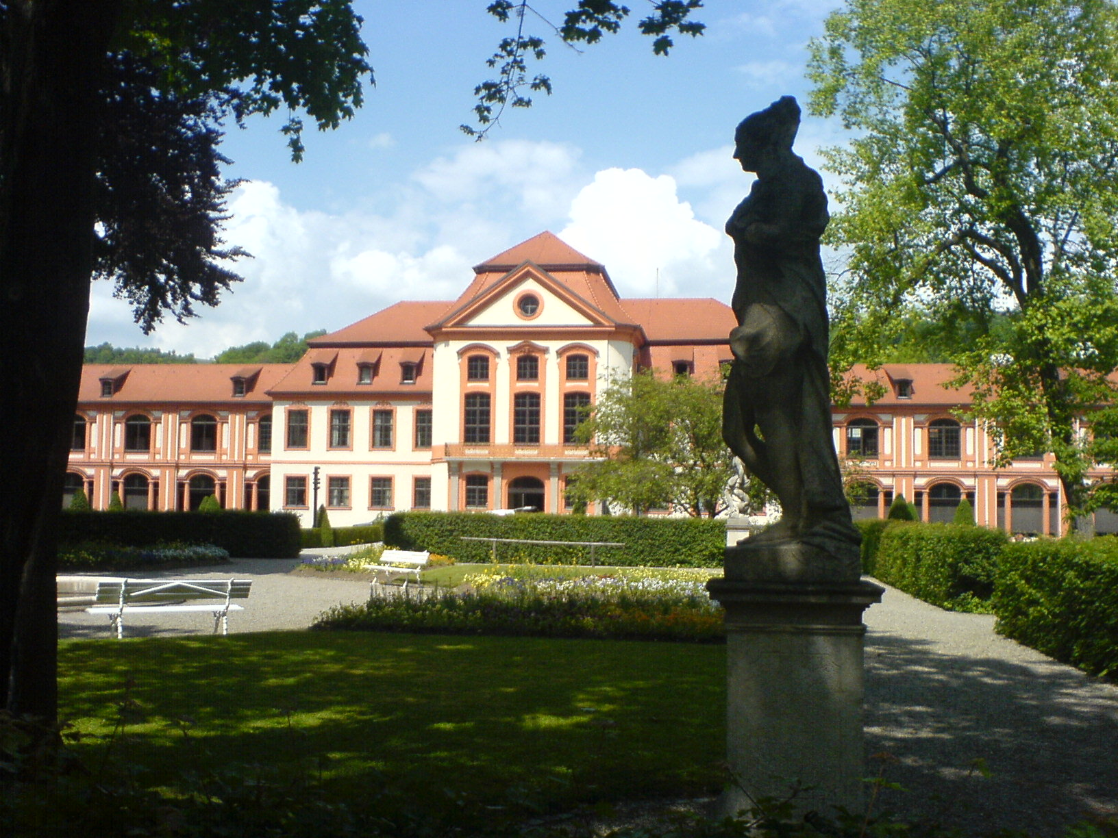 Sommerresidenz der Katholischen Universität Eichstätt-Ingolstadt